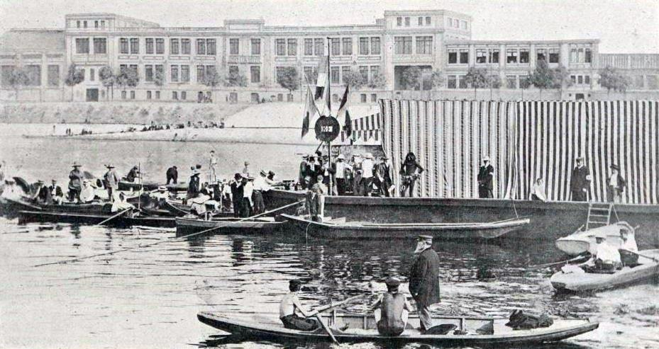 La tribune flottante du jury, sur le bassin d'Asnières pour les compétitions de natation des Jeux Olympiques de 1900.